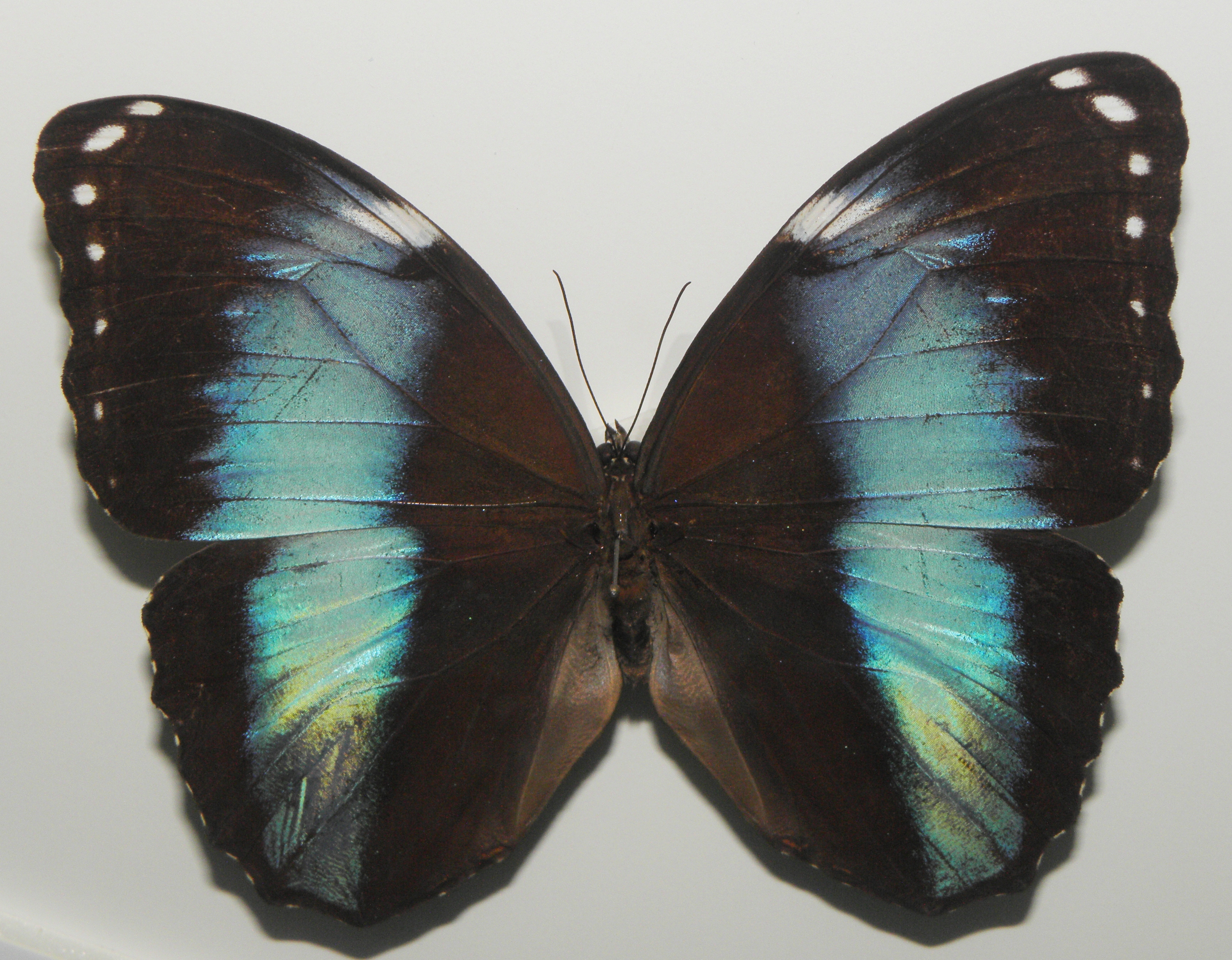 Morpho helenor achillides (= Morpho achilles achillides). Colectada en la provincia de Misiones, Argentina.